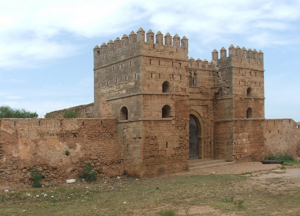 Puerta de la alcazaba de Mehdia